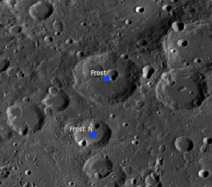 Cráter lunar Frost. Cráteres satélite. (Imagen LRO)